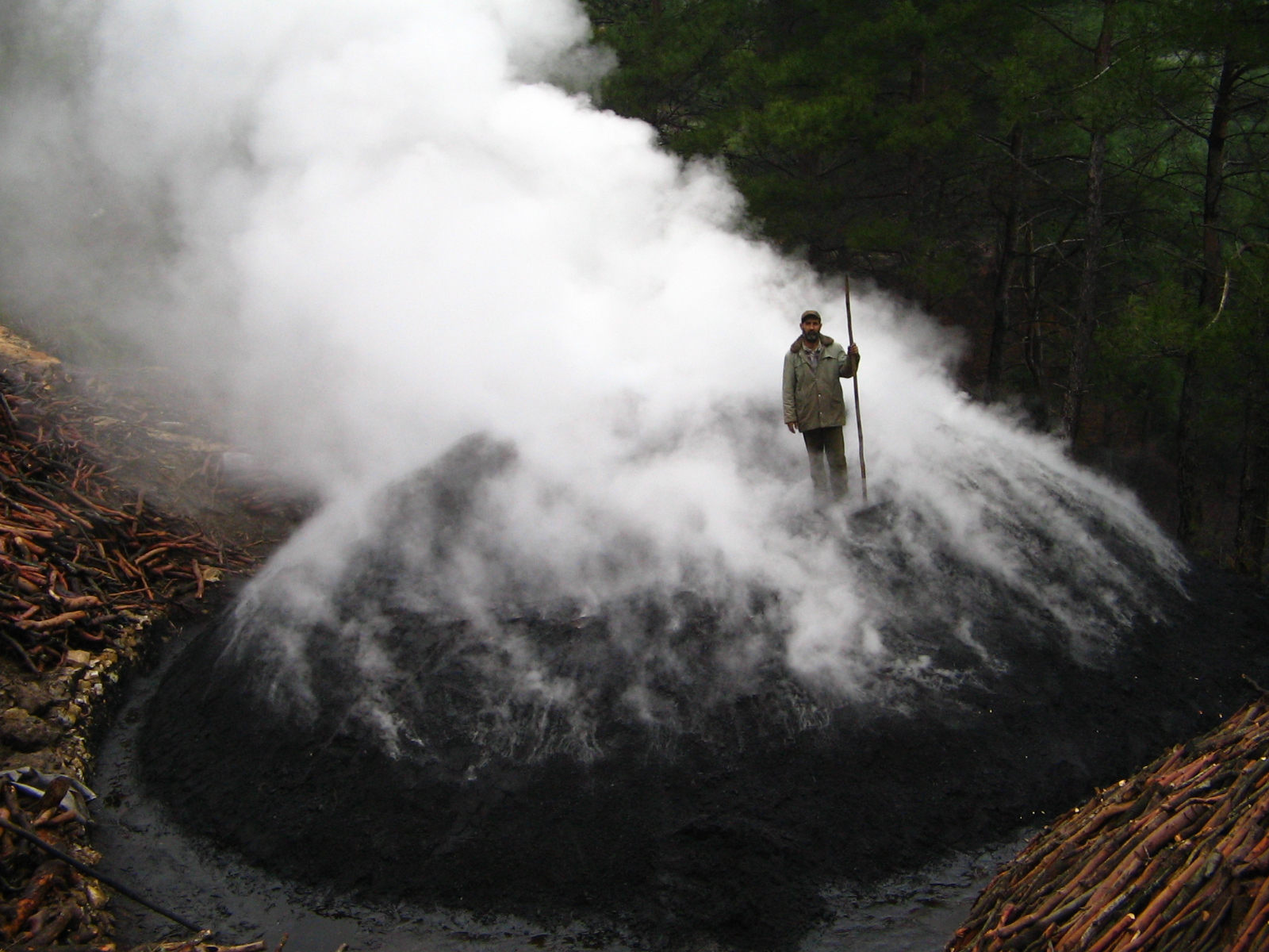 adam ne yapıyor(kömür yapıyor)